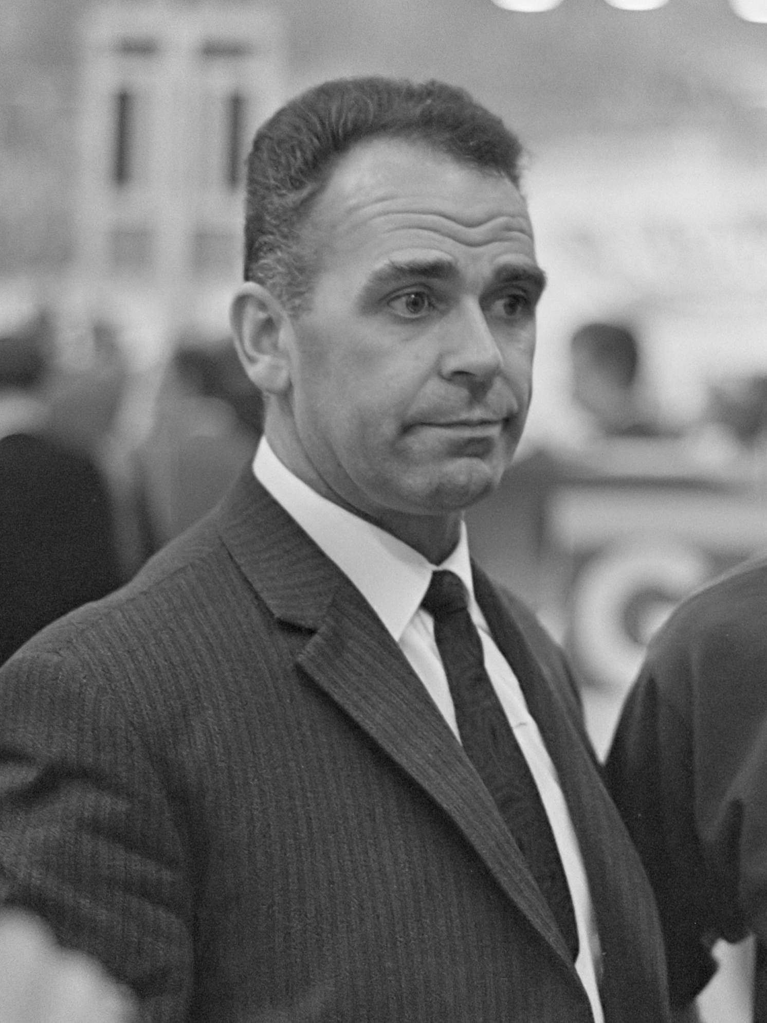 Zesdaagse Amsterdam, nummer 17, 18 en 19 - Rik Van Steenbergen (links) en Peter Post 7 december 1967